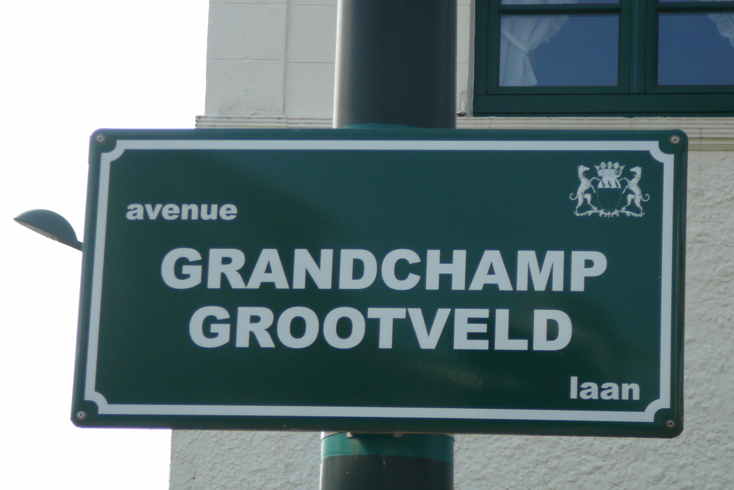 Panneau de l'Avenue Grandchamp, à Woluwe-Saint-Pierre, en Région de Bruxelles-Capitale, Belgique